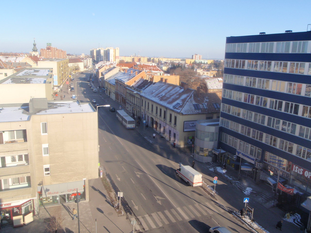 Steinamanger, Blick vom Rathaus aus Thököly Strasse